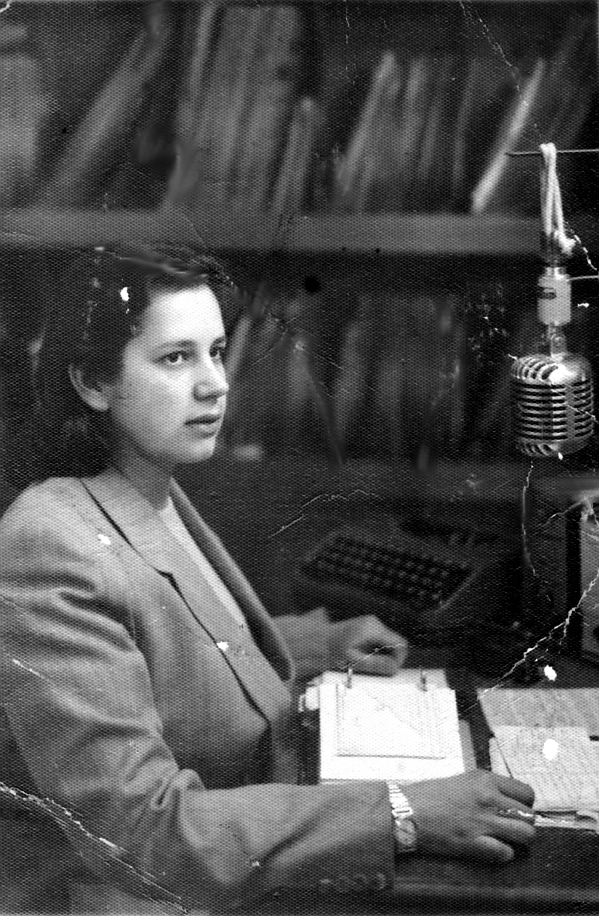 Juana Cervera Torres at the radio studio, 10th Yungay Street, Curicó, Chile (1950's decade)